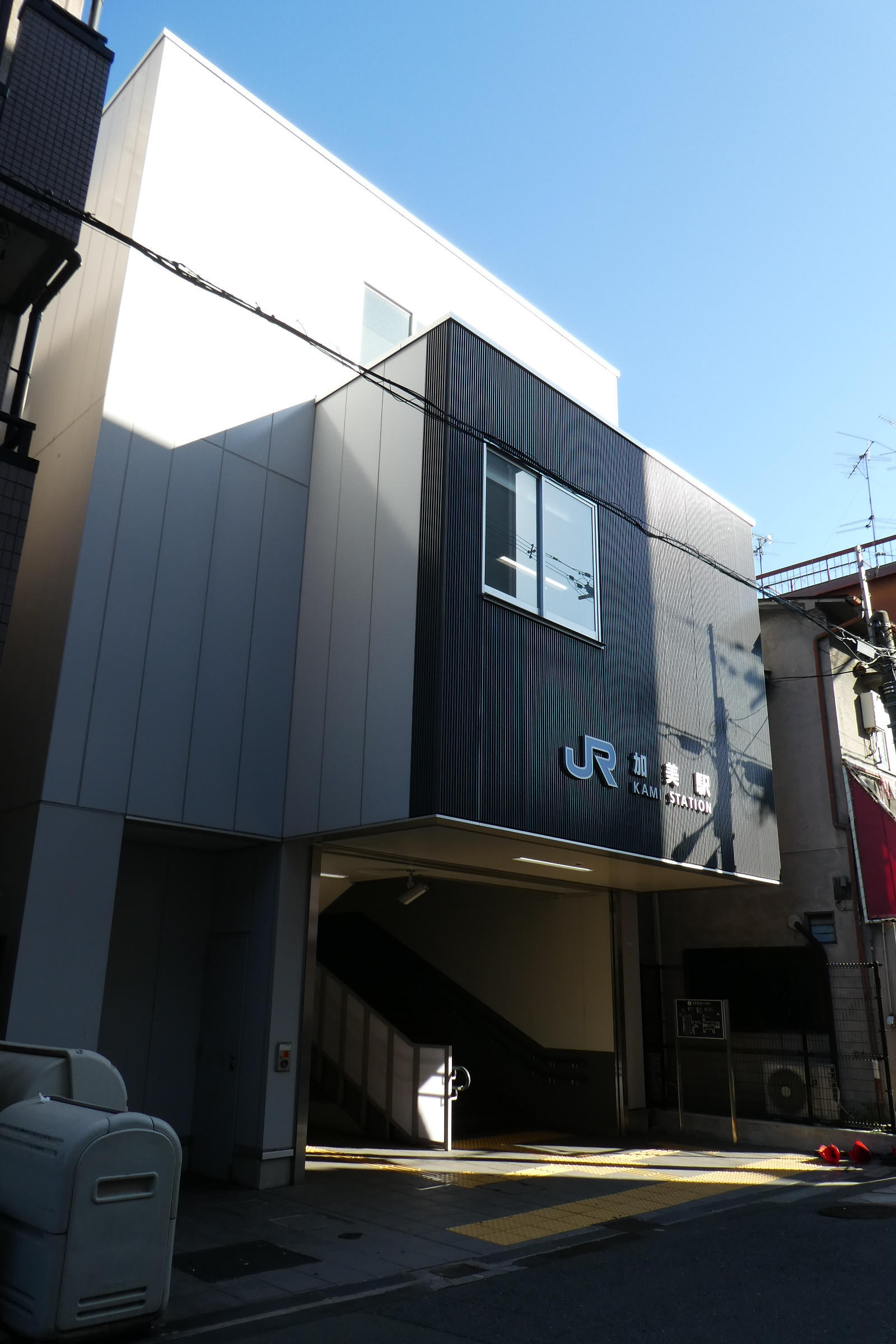 関西本線（大和路線）加美駅南口